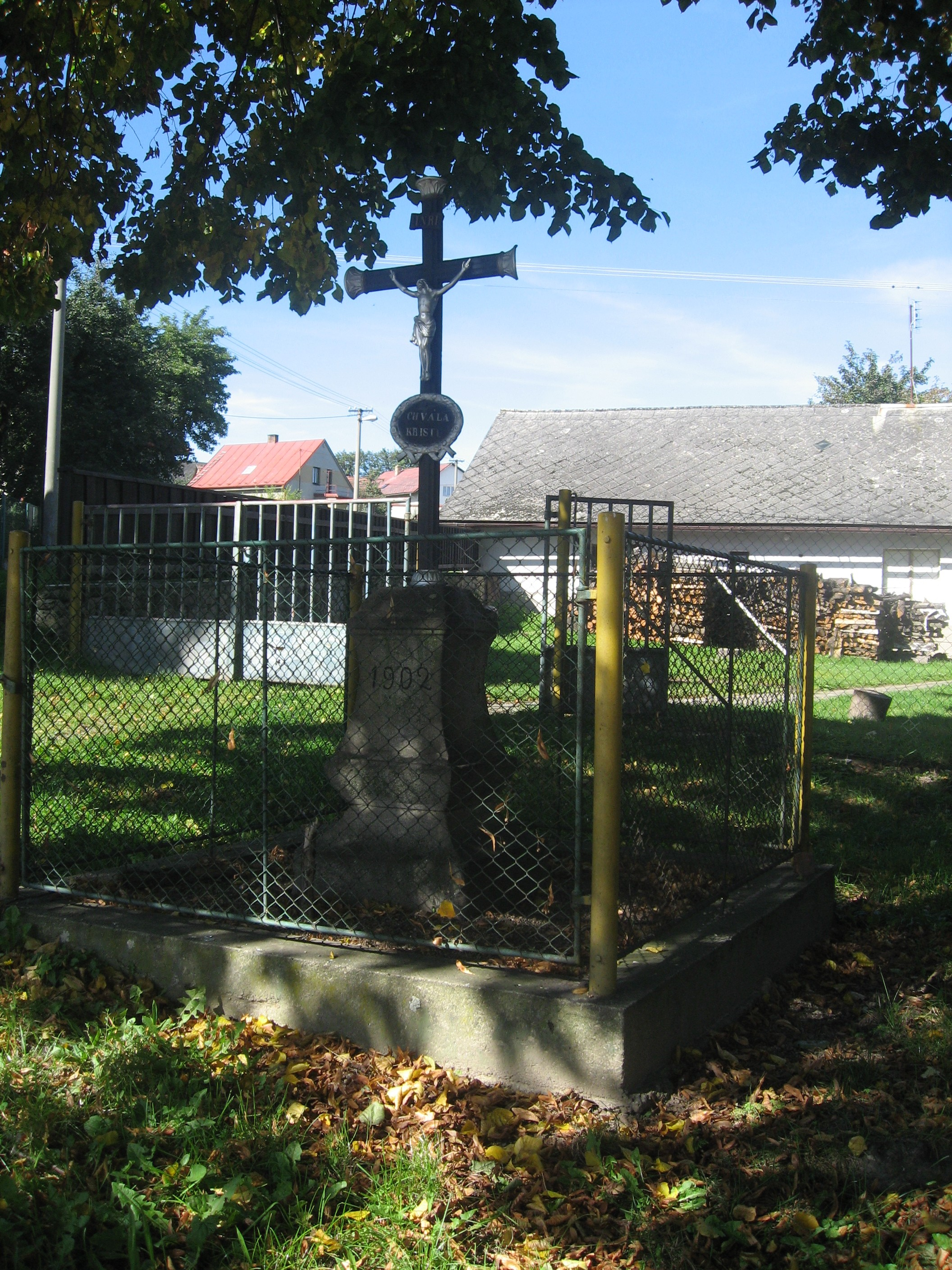 Ves Leština, součást obce Věž